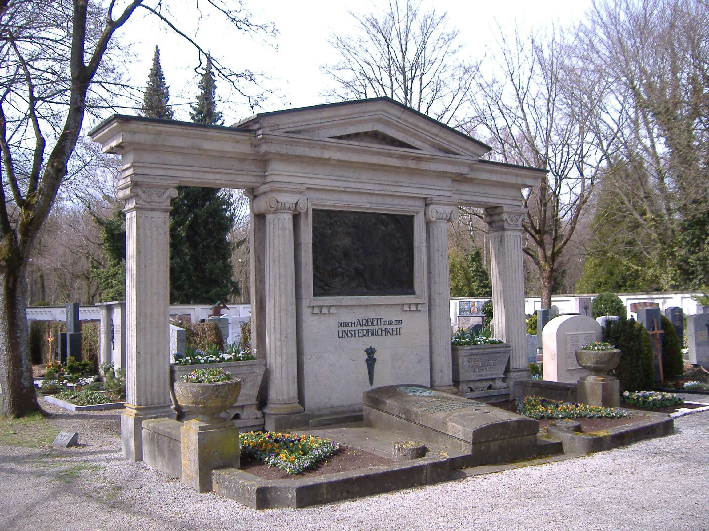 Grabmal Hessing